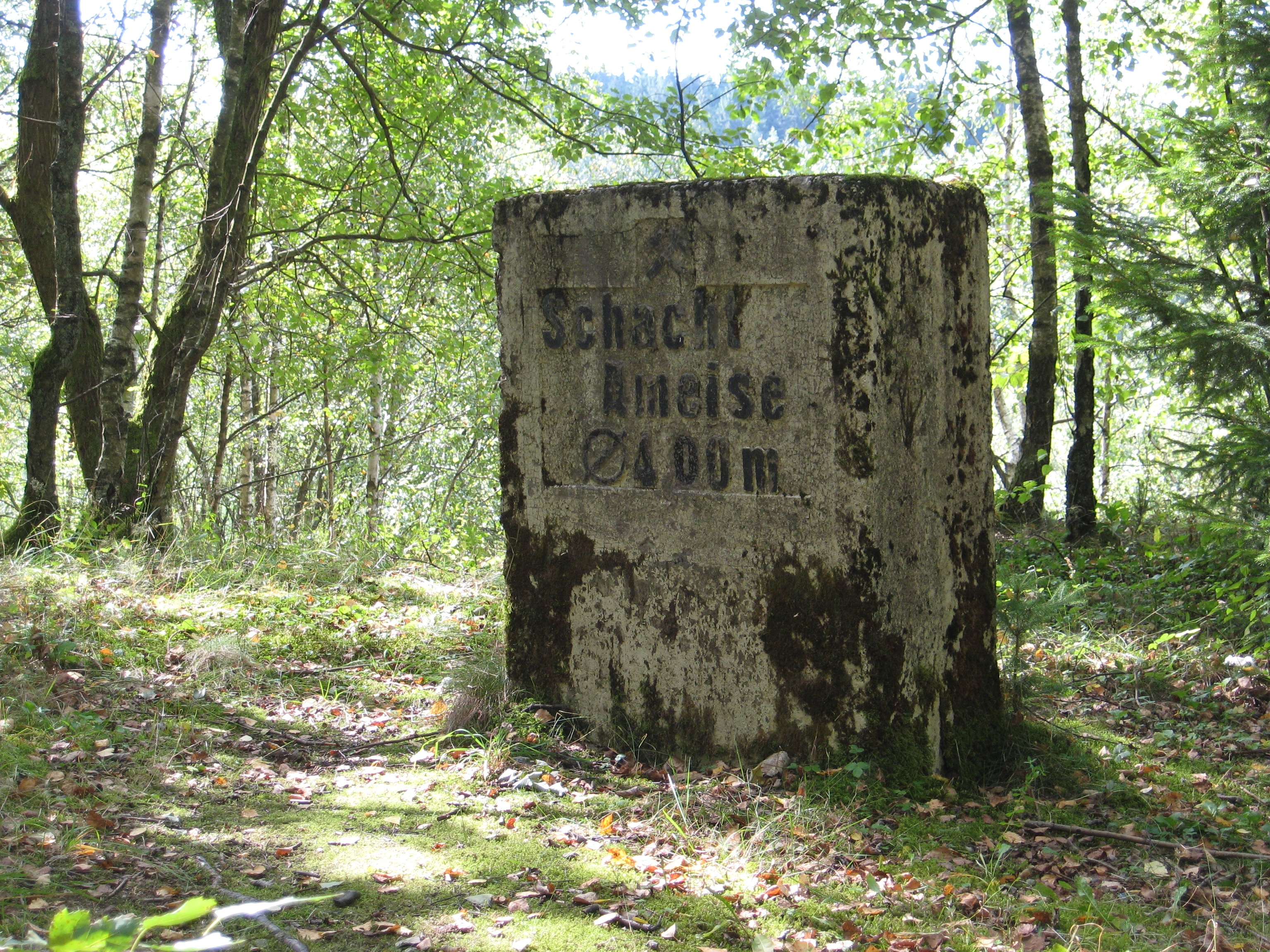 Grube Ameise im Leimbachtal bei Siegen (stillgelegt November 1956): Schachtstein am ehemaligen Standort des 885 m tiefen Schachtes